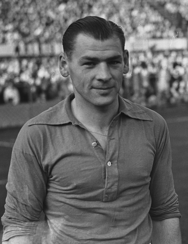 Frans Tebak.